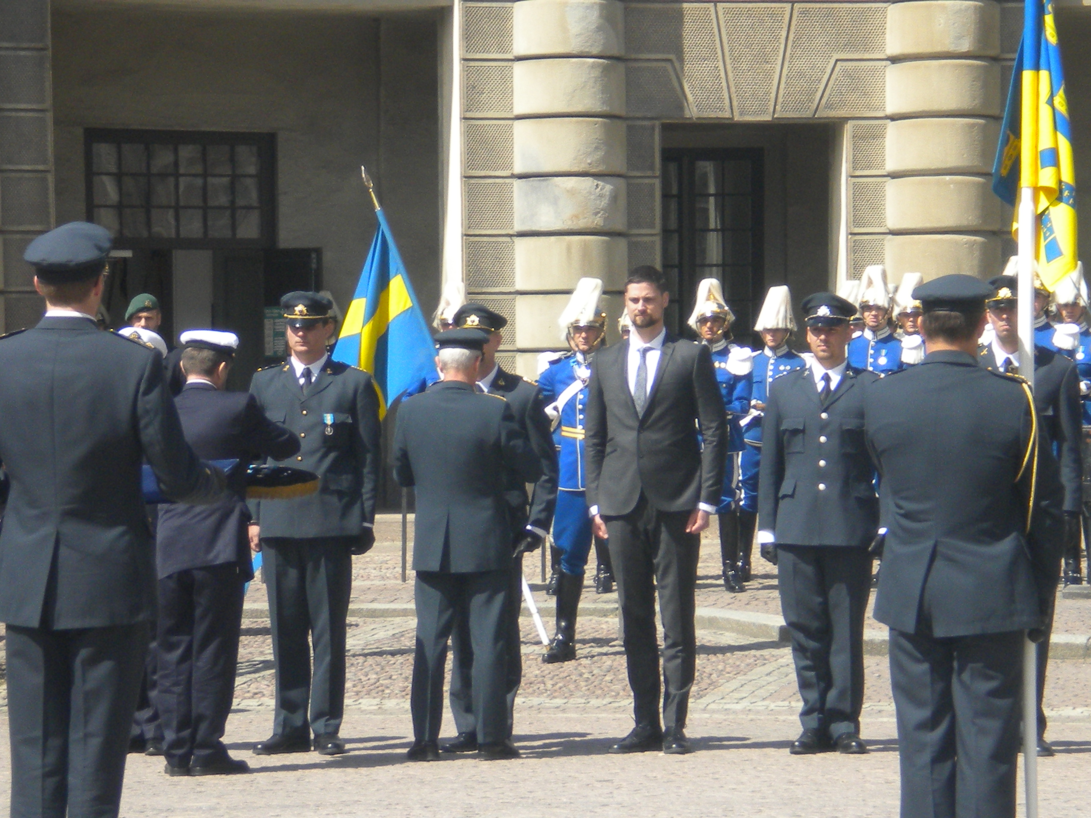 Överbefälhavaren General Sverker Göransson utdelar Försvarsmaktens Förtjänstmedalj till svenska FN-soldater i samband med högvaktsavlösning på Nationaldagen 2012.